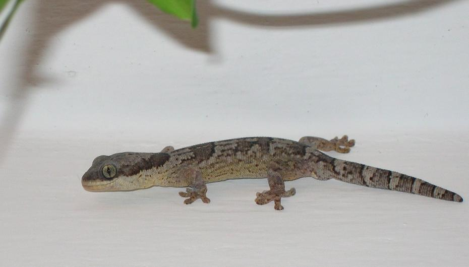 gekon Homopholis fasciata